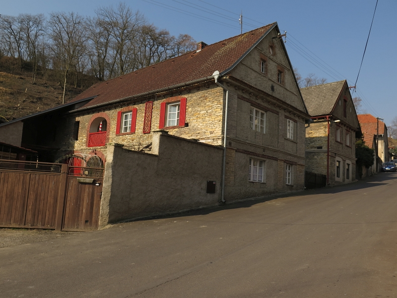 Usedlost čp. 18, Brzánky 18, Brzánky.